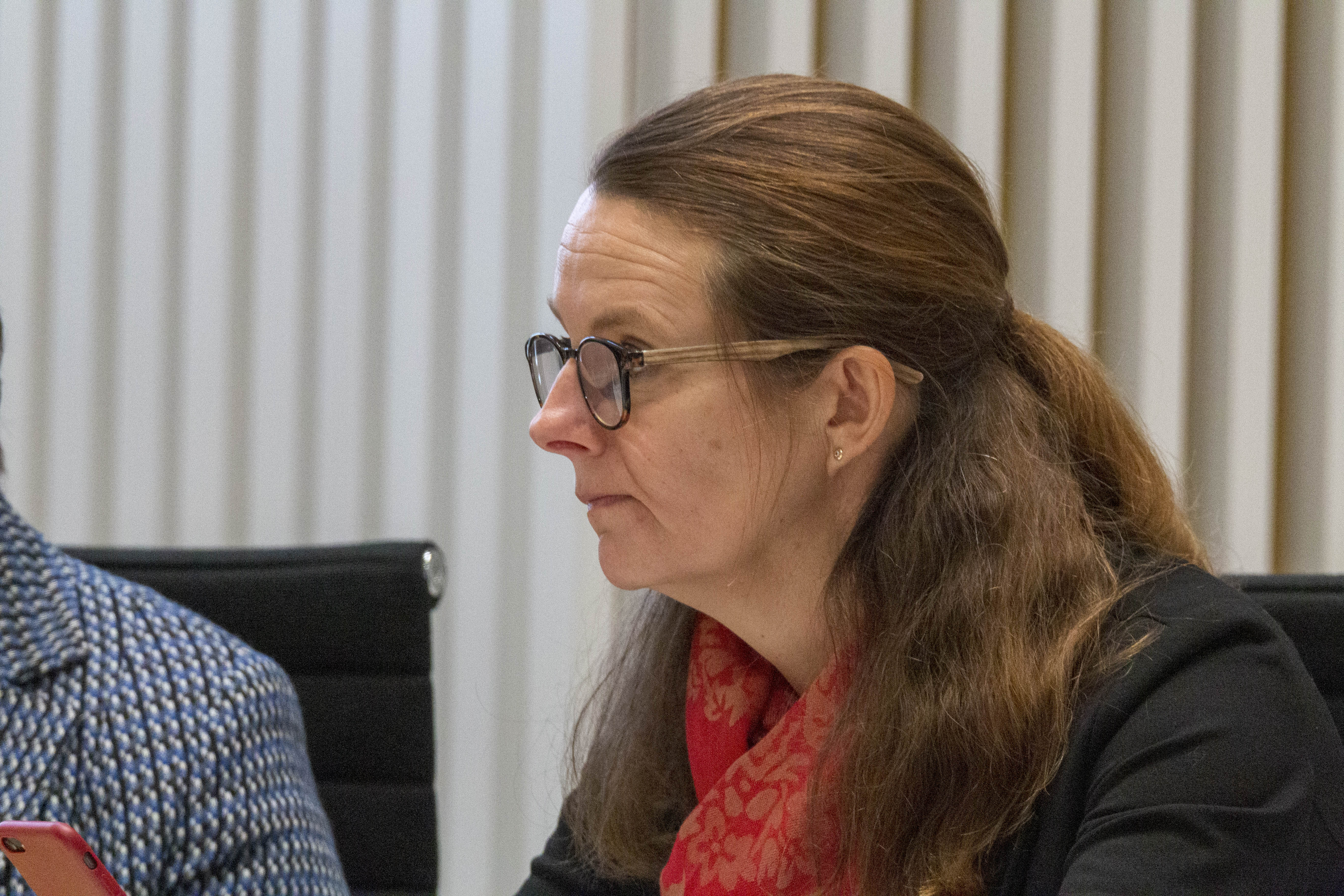 Abgeordnete des Landtages Mecklenburg-Vorpommern während einer Plenarsitzung Ende Januar 2020 in Schwerin.